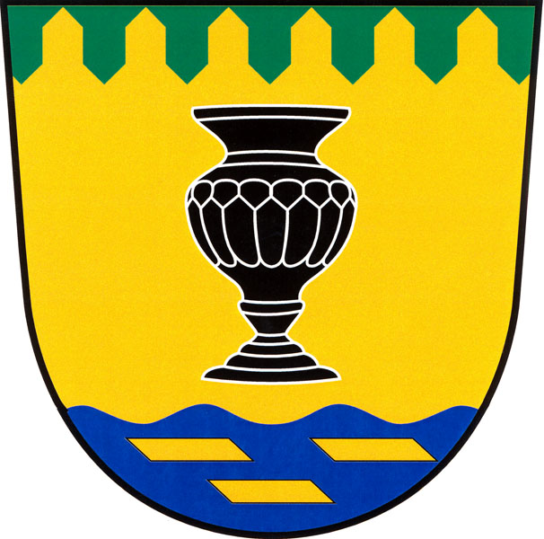 Znak obce Pohorská Ves